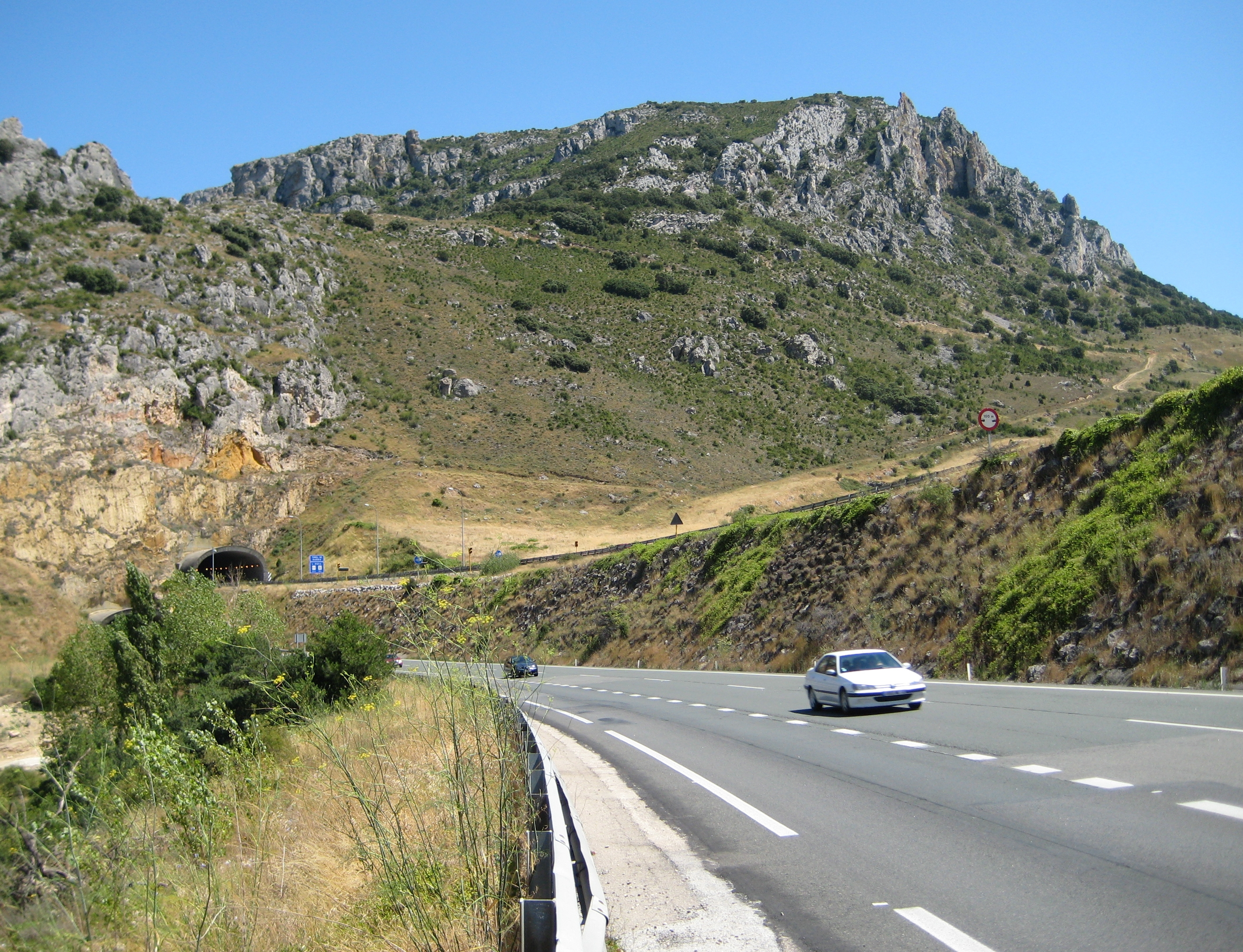 Autopista AP-I a su paso por el Puerto de Pancorbo (Túnel de Barrio)